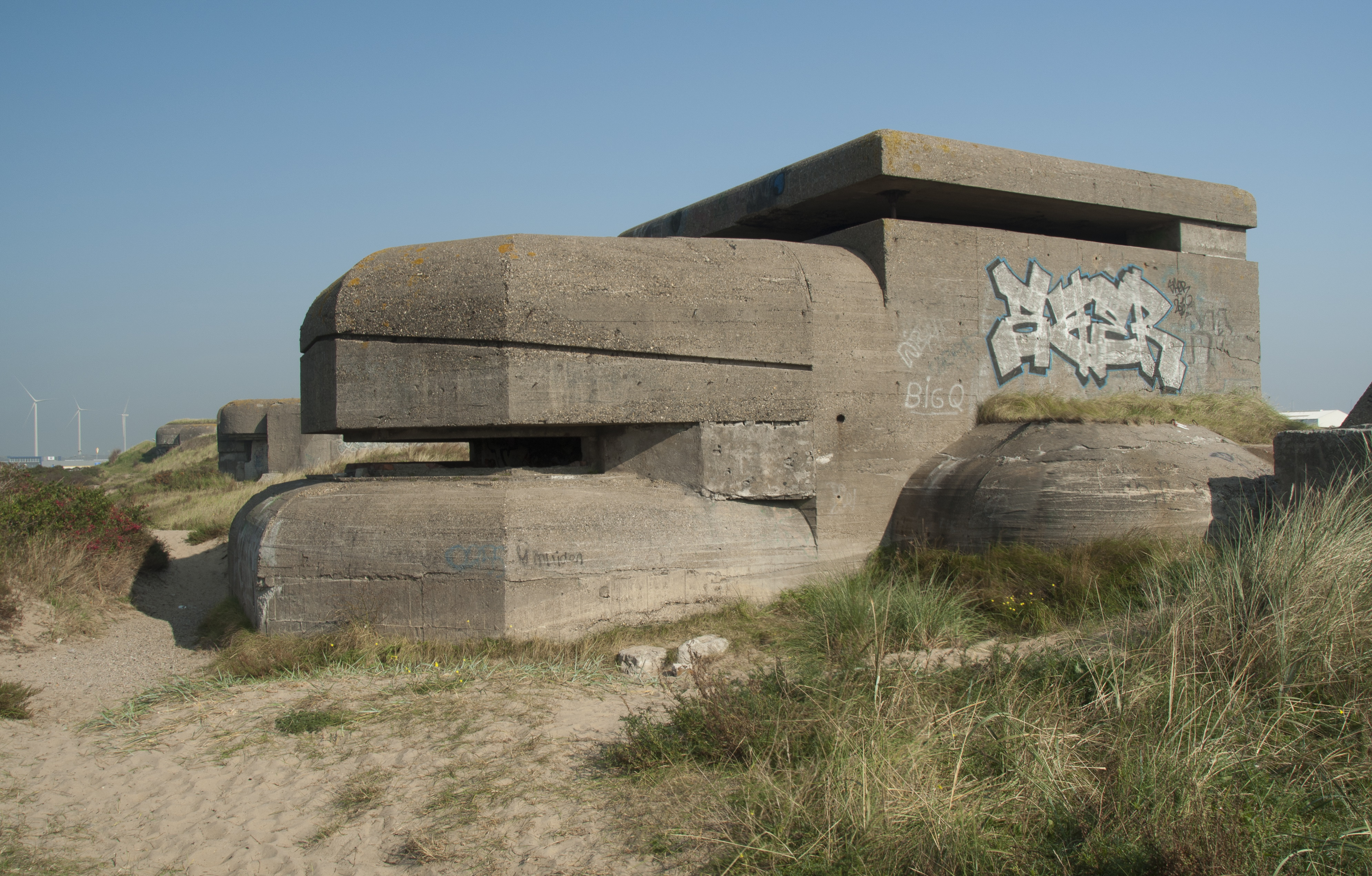 Bunkers atlantikwall IJmuiden Netherland